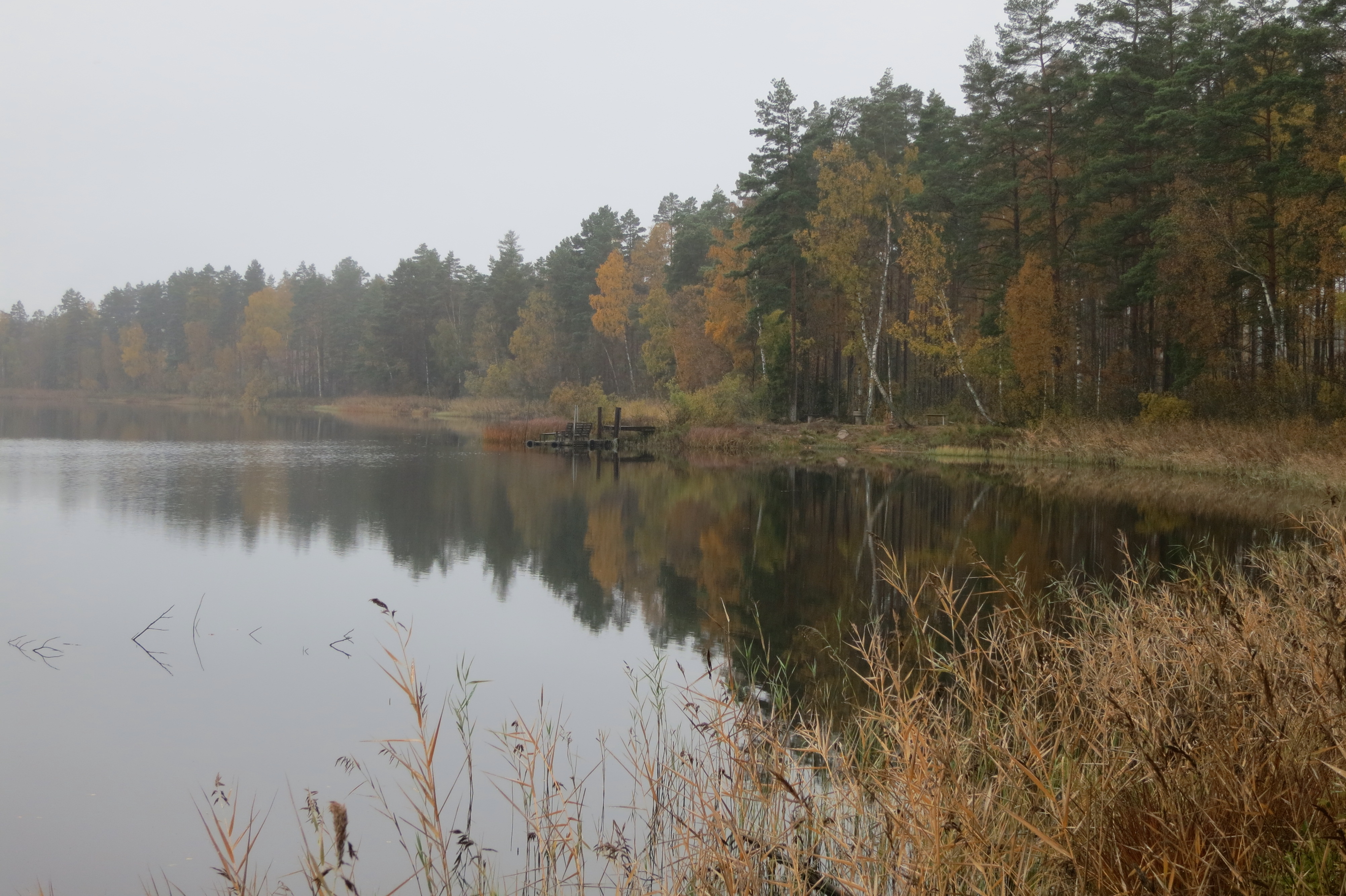 Sjön Bastsjön, Tingsryds kommun